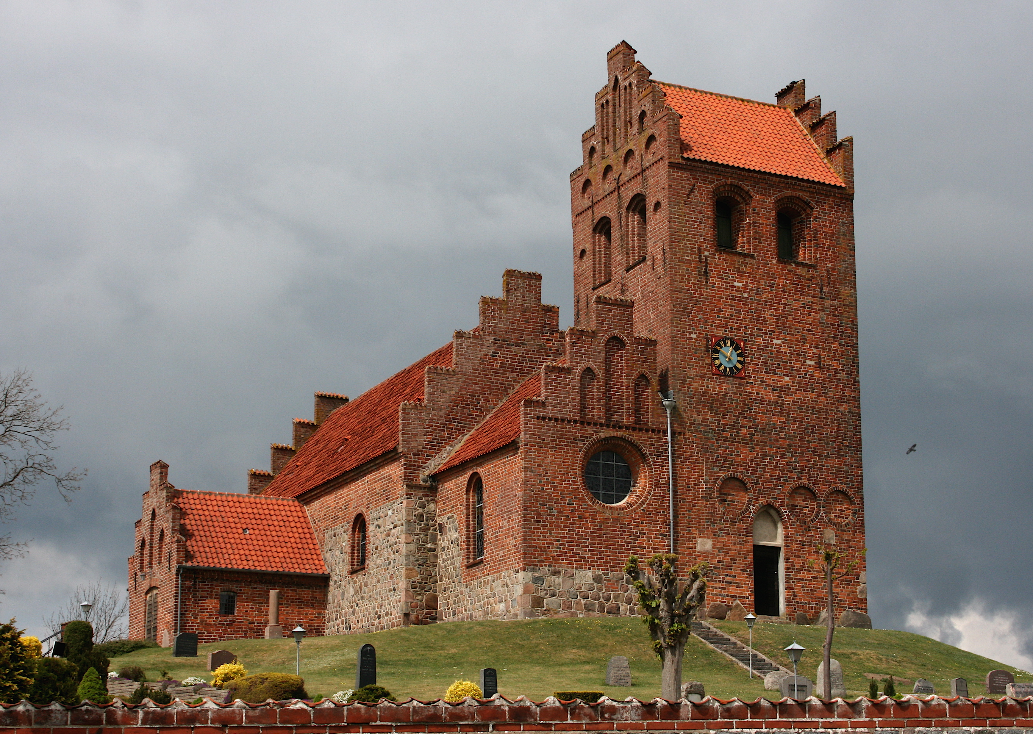 Kregme Kirke